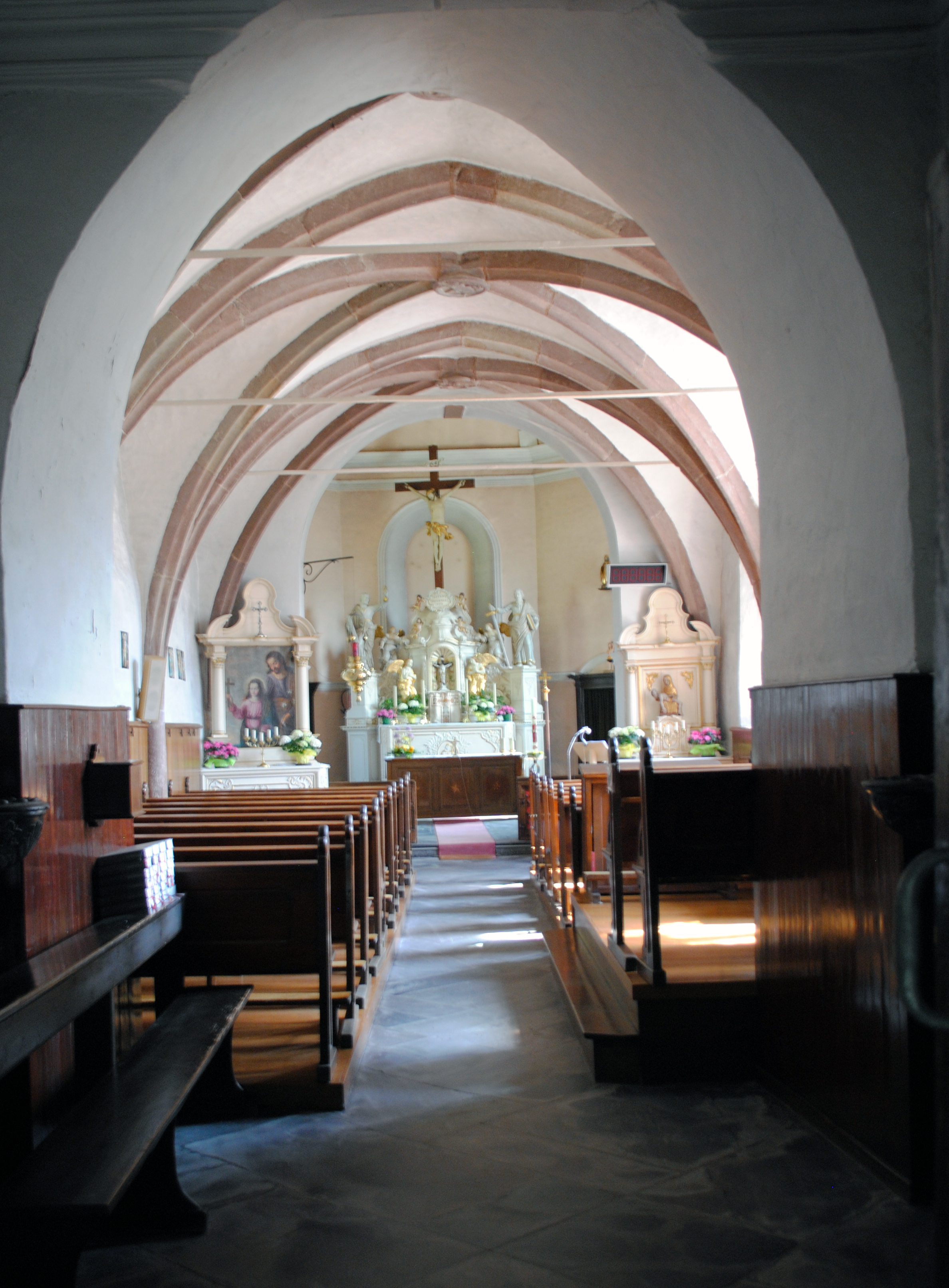 St. Peter, Ouren, Innenraum